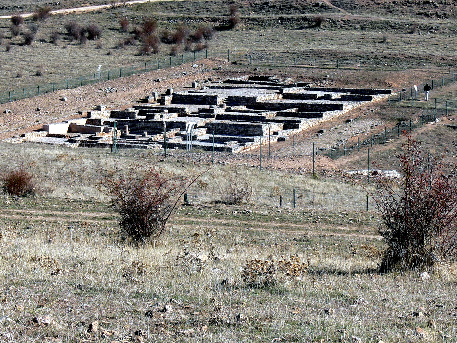 Ruinas de Uxama en El Burgo de Osma, Soria - España.